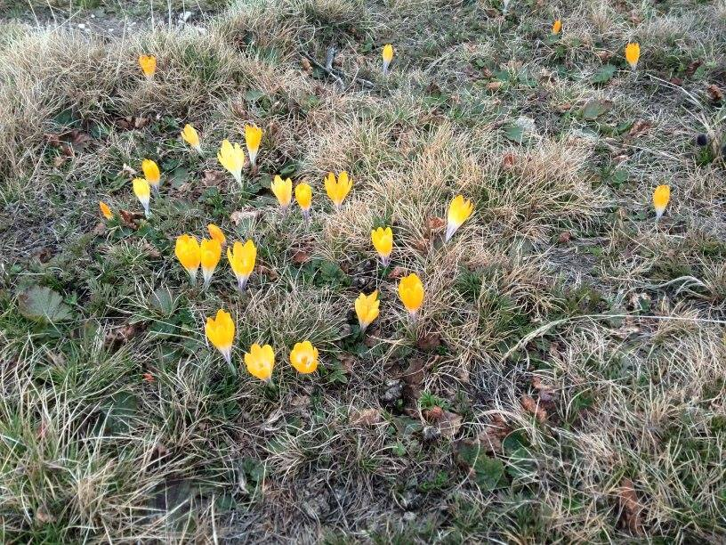 По пат (искачување) за Титов Врв.